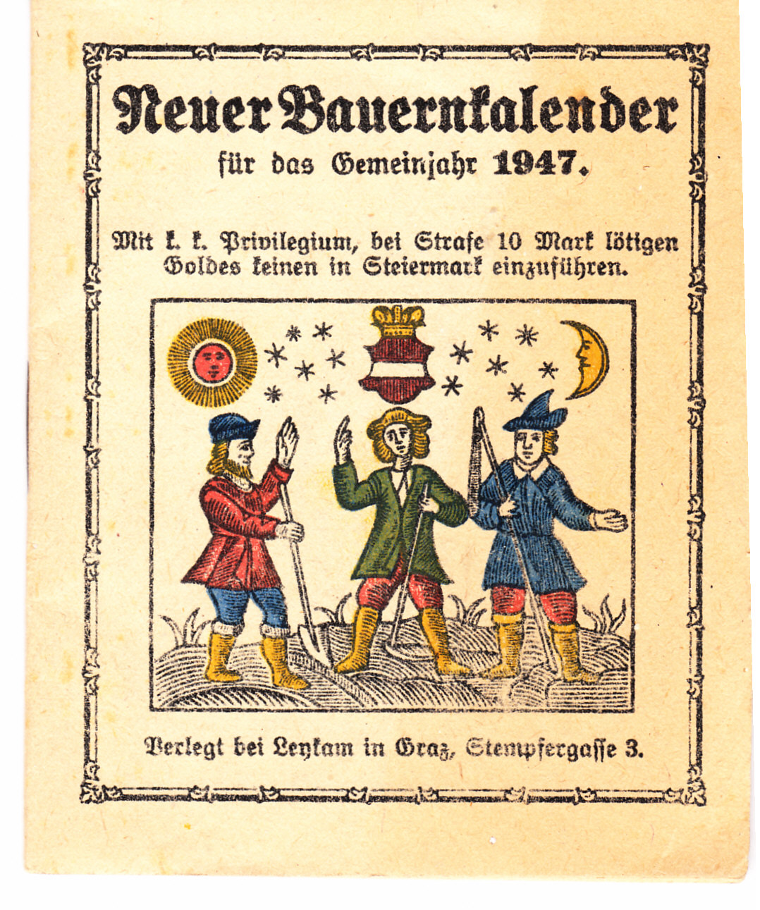 Titelblatt des Mandlkalenders 1947 (Neuer Bauernkalender 1947)